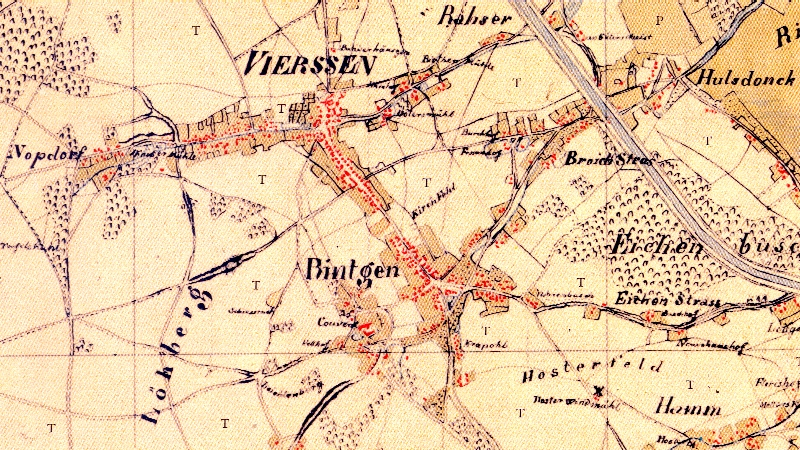 Kartenaufnahme der Rheinlande durch Tranchot und von Müffling, Blatt 42 (Viersen), Ausschnitt mit dem Gebiet der Dörfer Viersen und Rintgen.